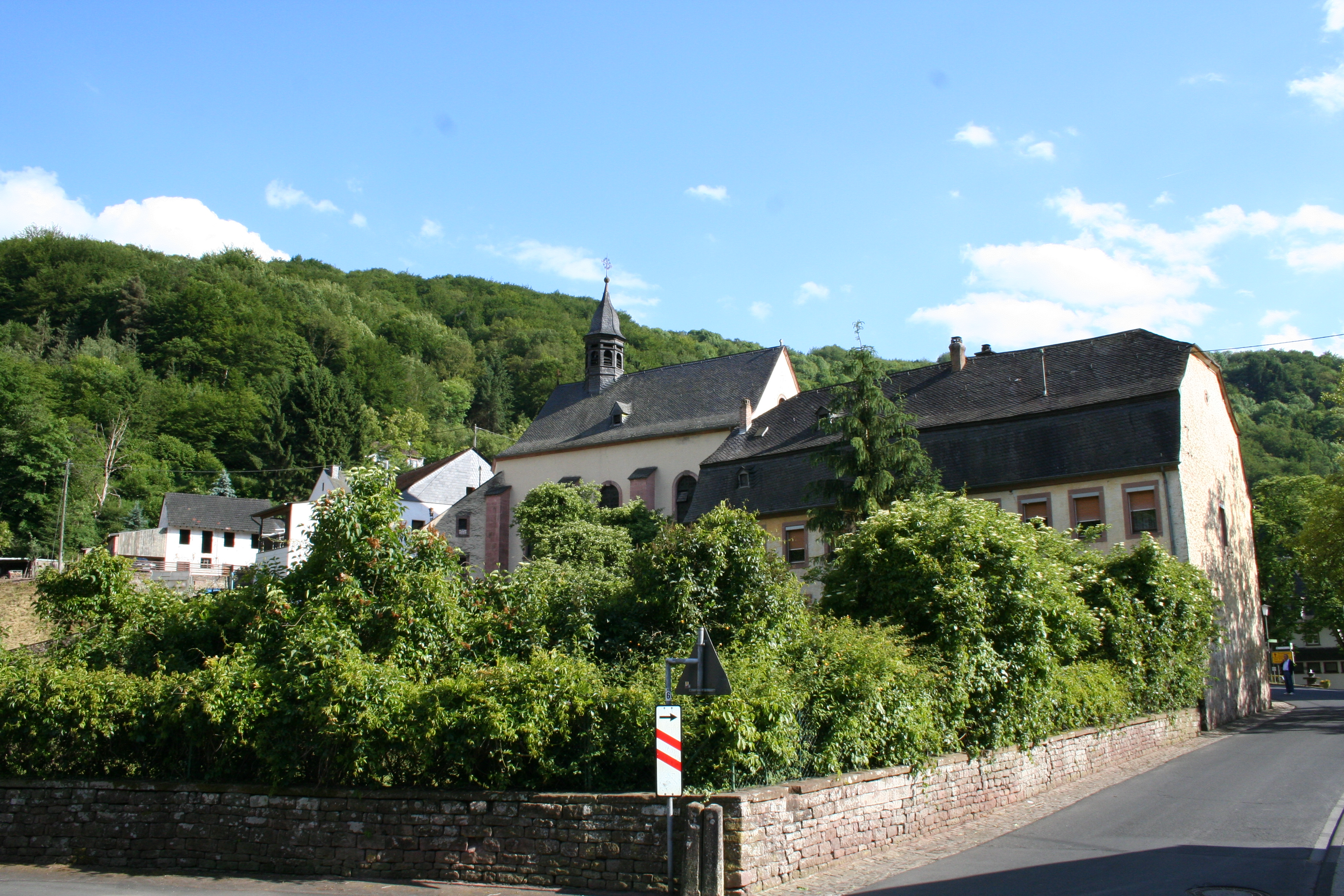 Pfarr-und Wallfahrtskirche zu Auw mit Pfarrhaus Pfarrkirche Auw mit Pfarrhaus, Juni 2005